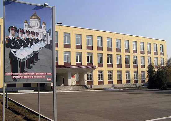 Здание Московского военно-музыкального училища